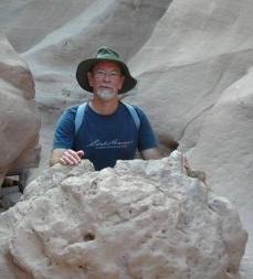 A picture of prof Sharir